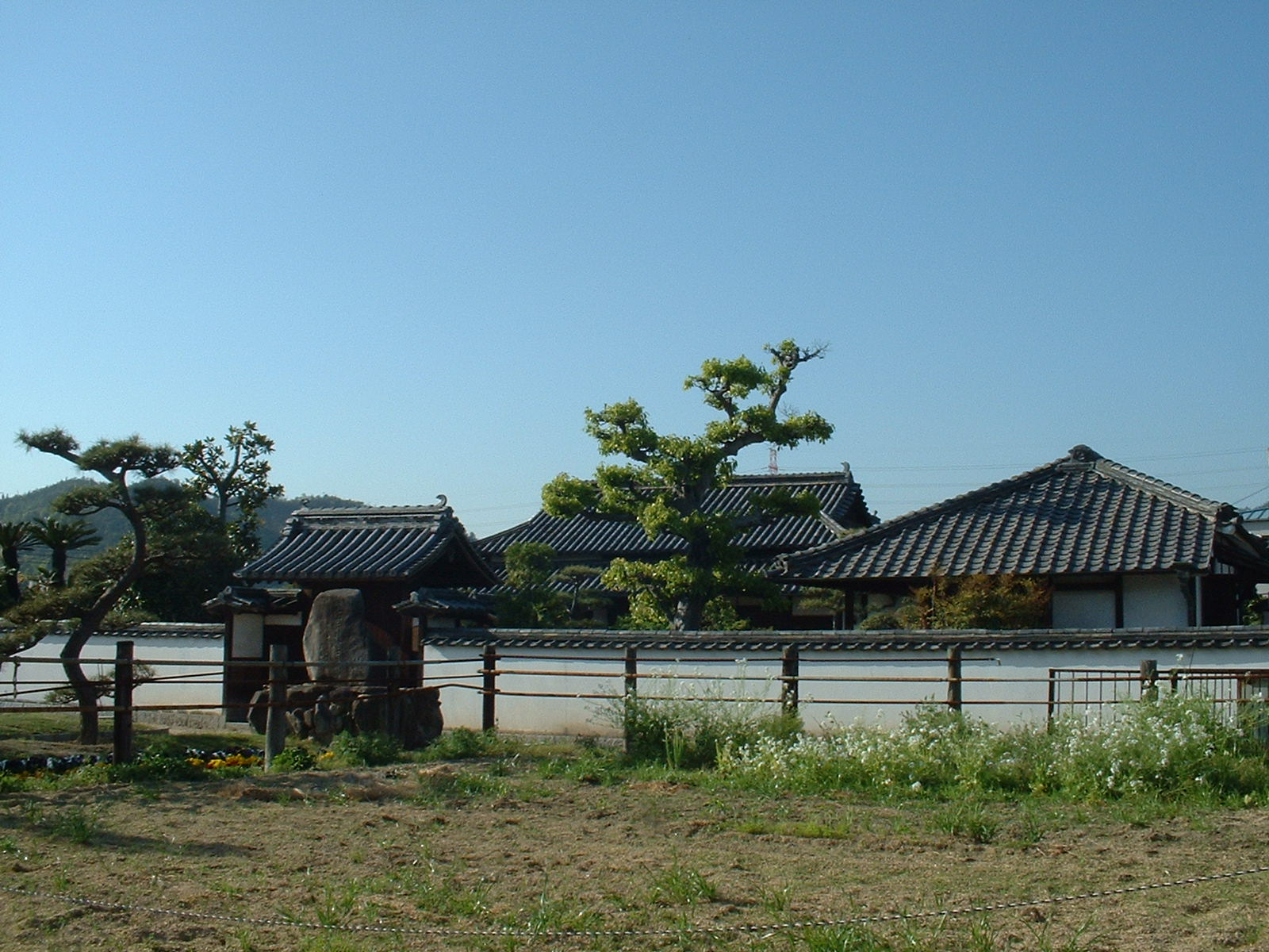 仁科芳雄生家